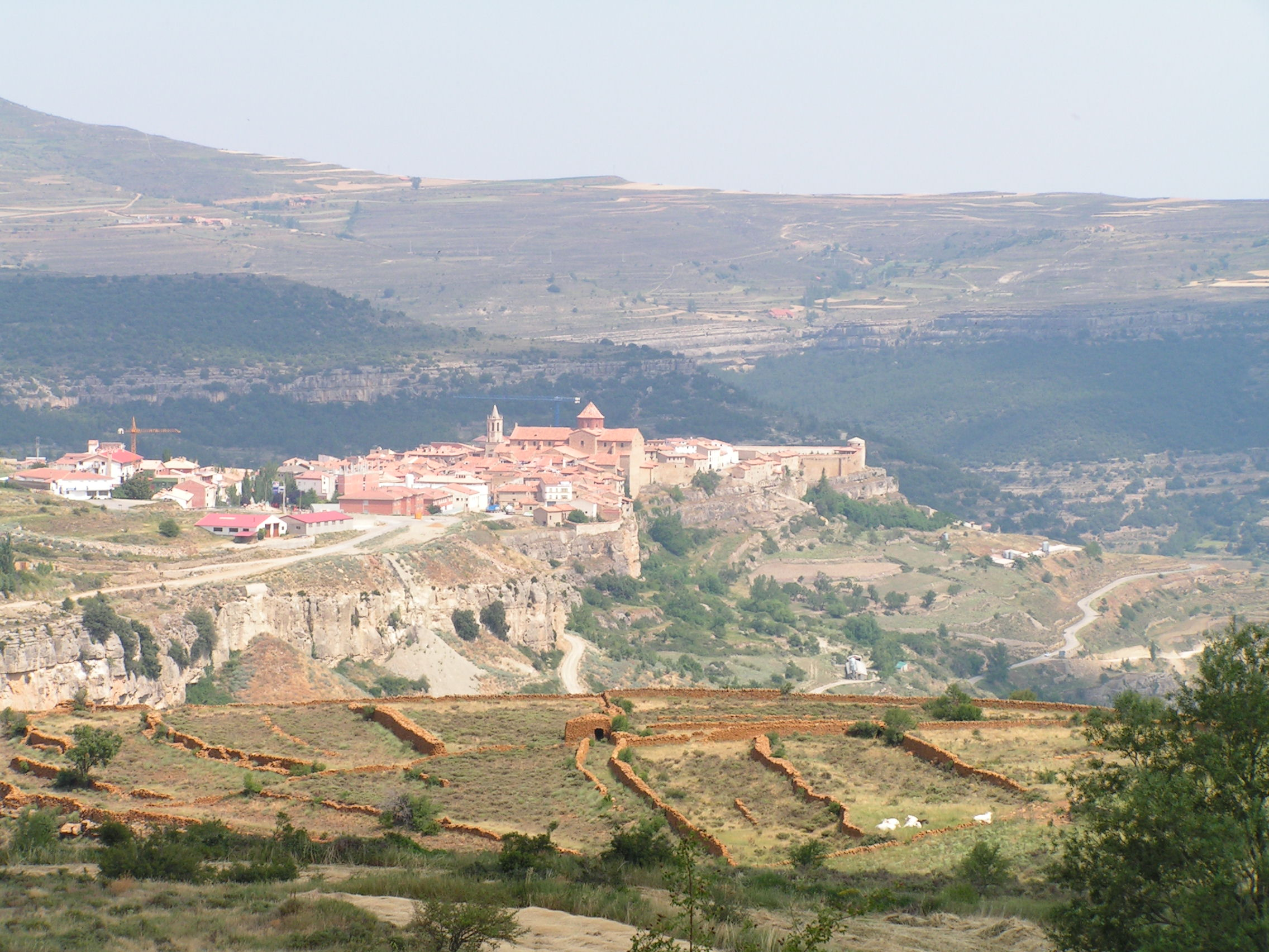 Aragonés: Cantabiella (Tergüel, Aragón)